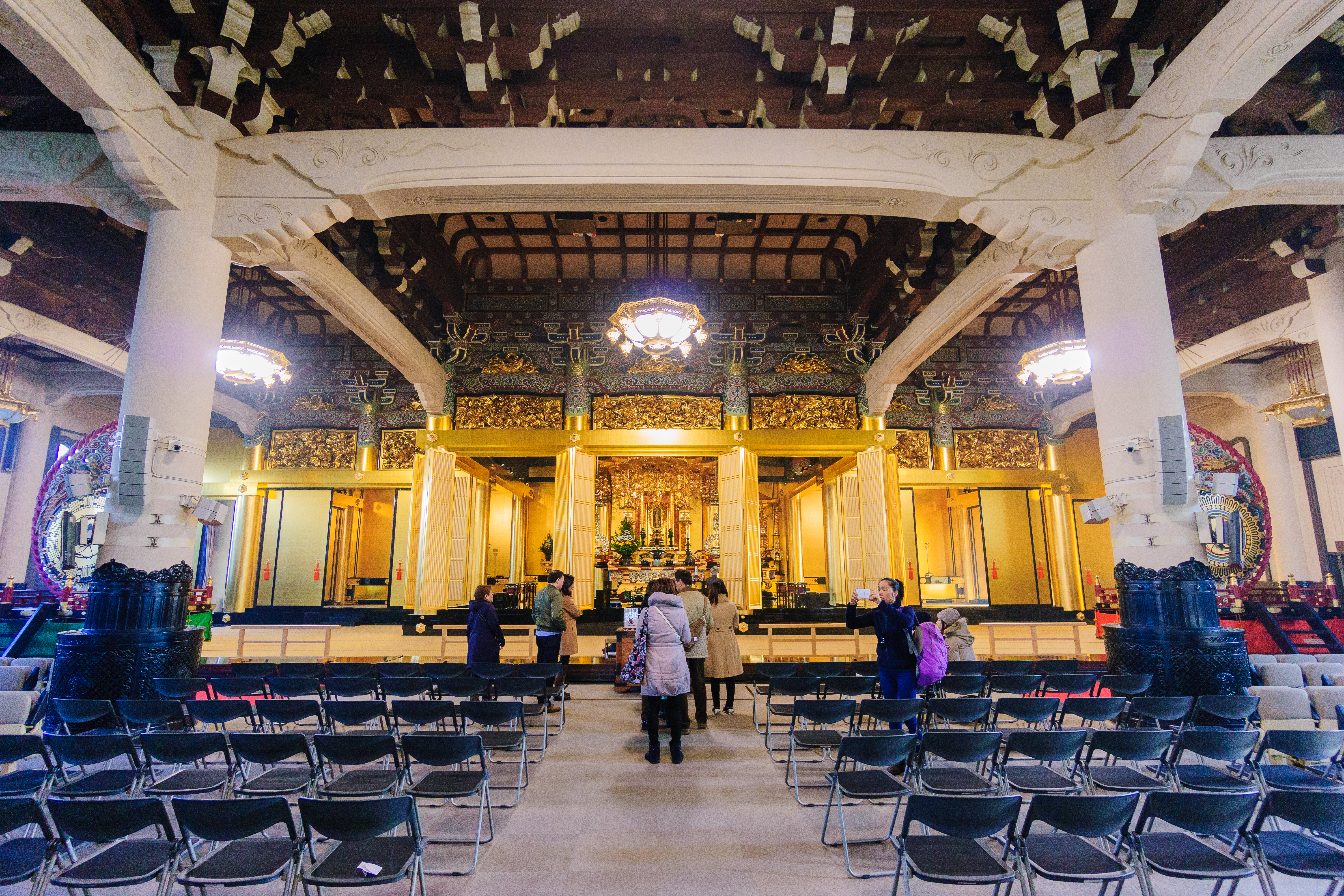 築地本願寺の本堂。